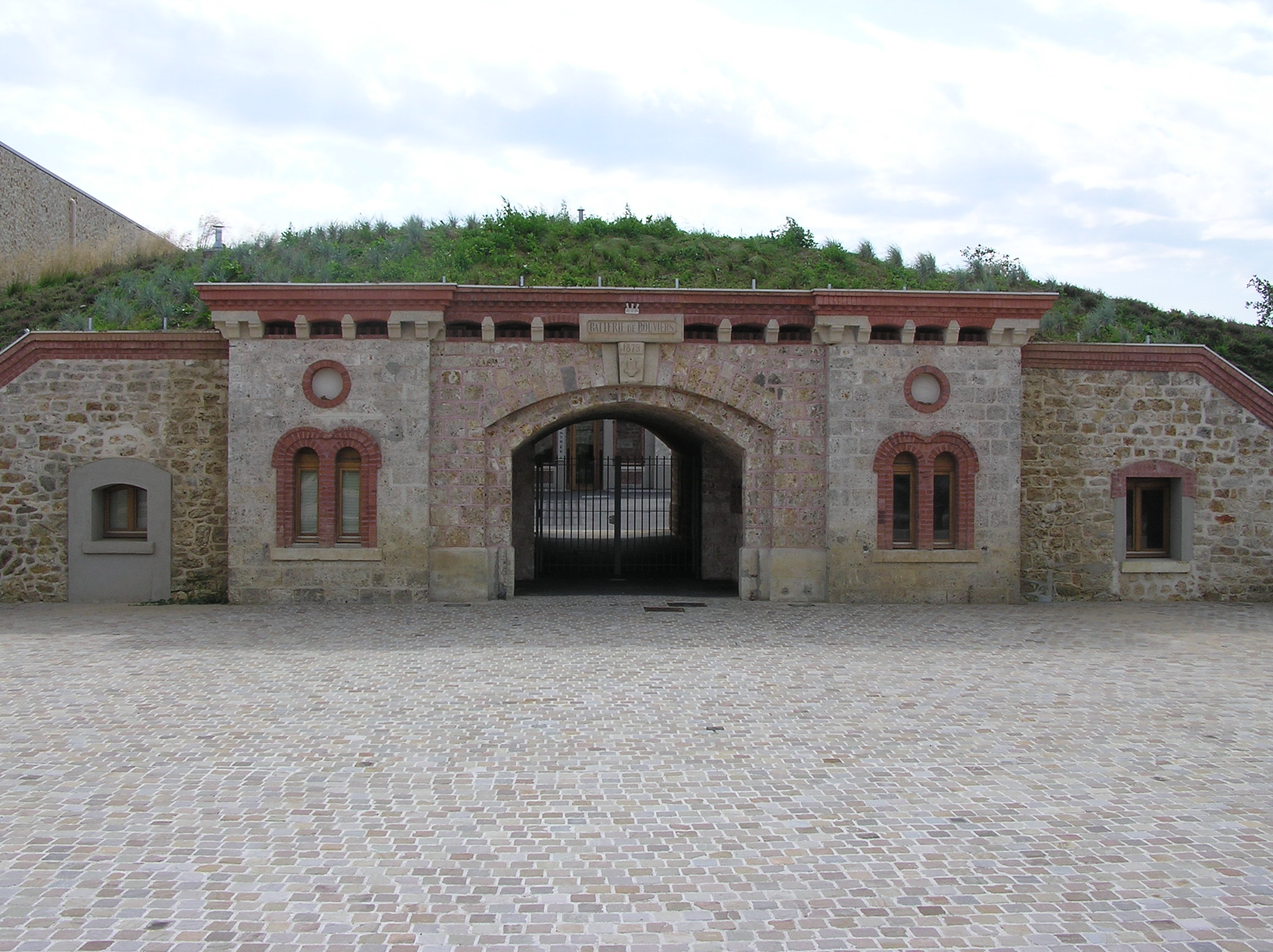 La Batterie entrée par le Parvis